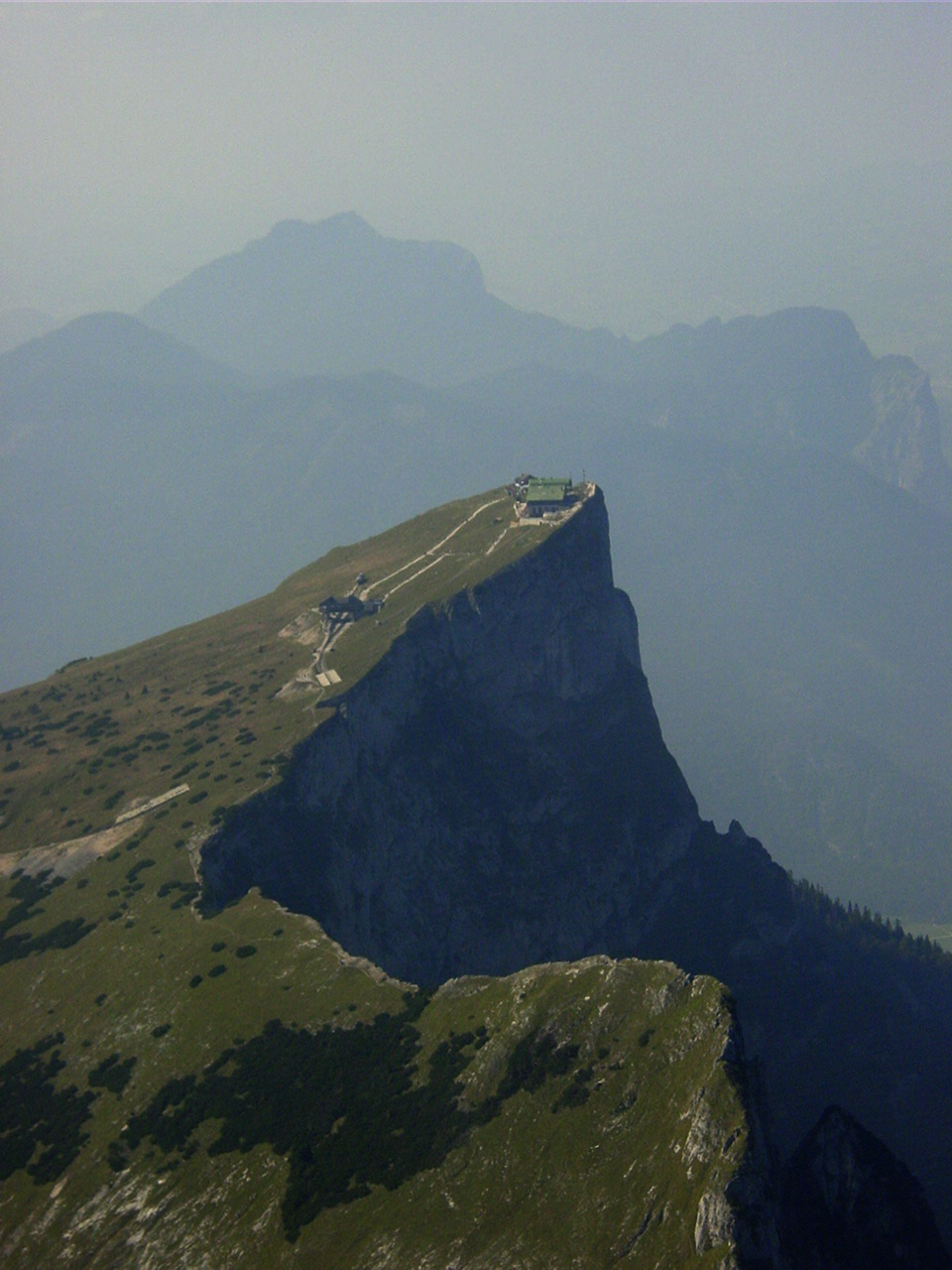 aerial photo of Schafberg (Austria) / Luftaufnahme Seewalchen (Österreich)